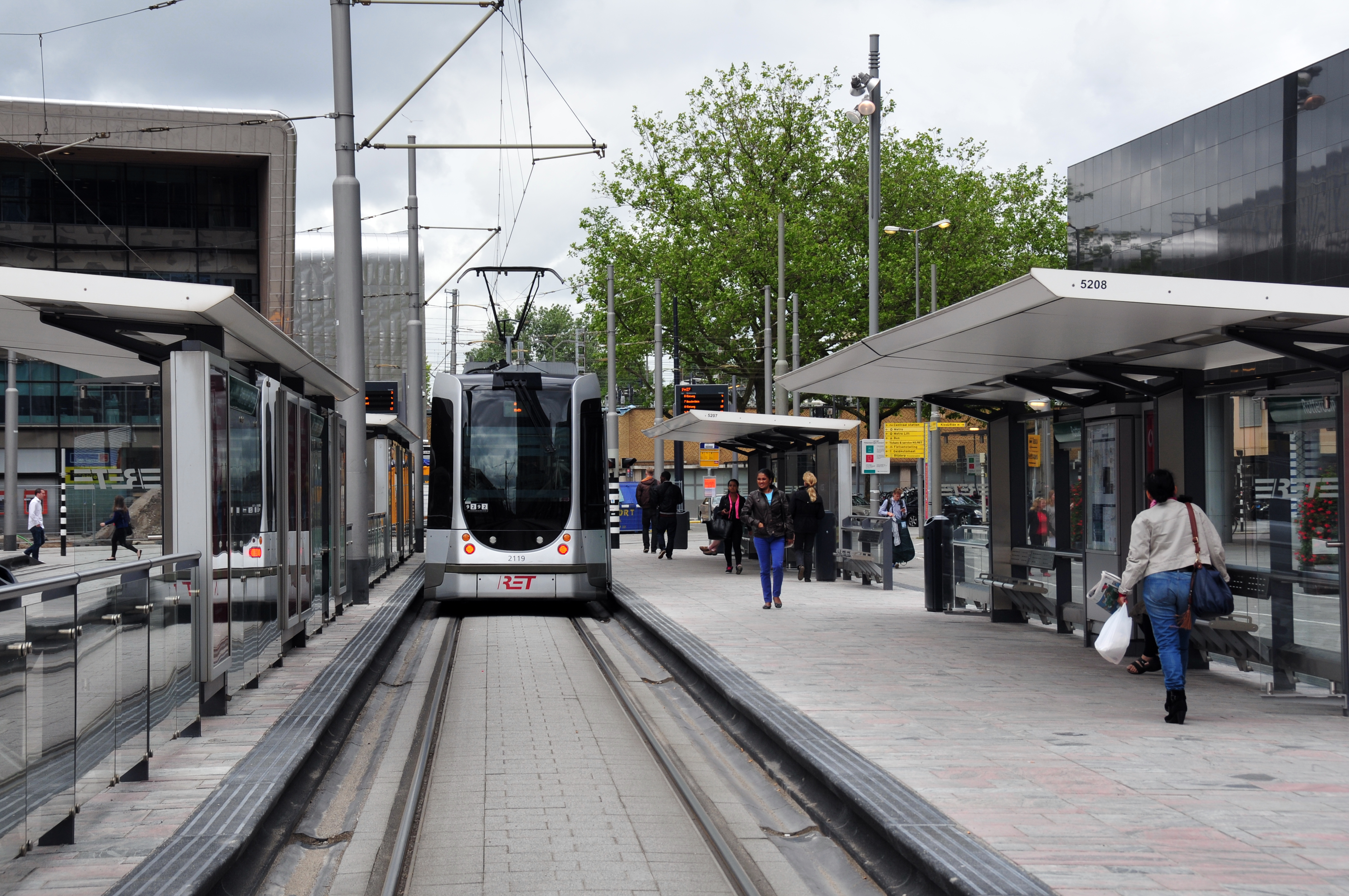 Rotterdam, Niederlande, 2013